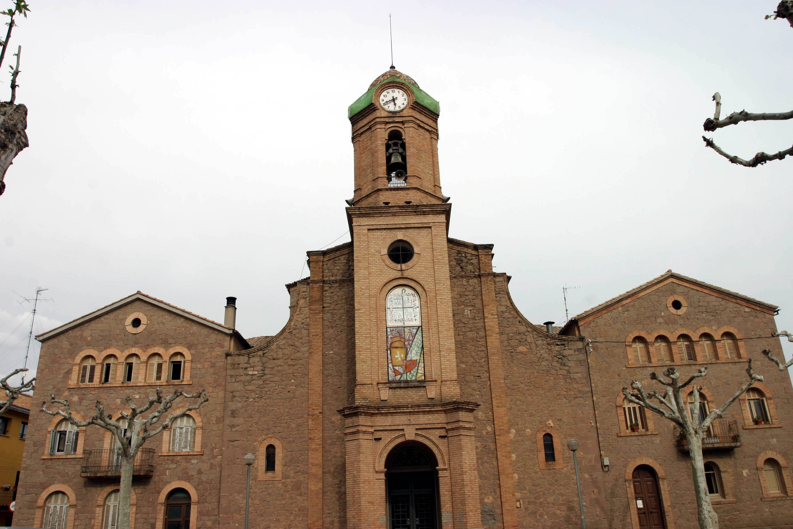 Església de la Sagrada Família de Navàs. Destaca el característic campanar